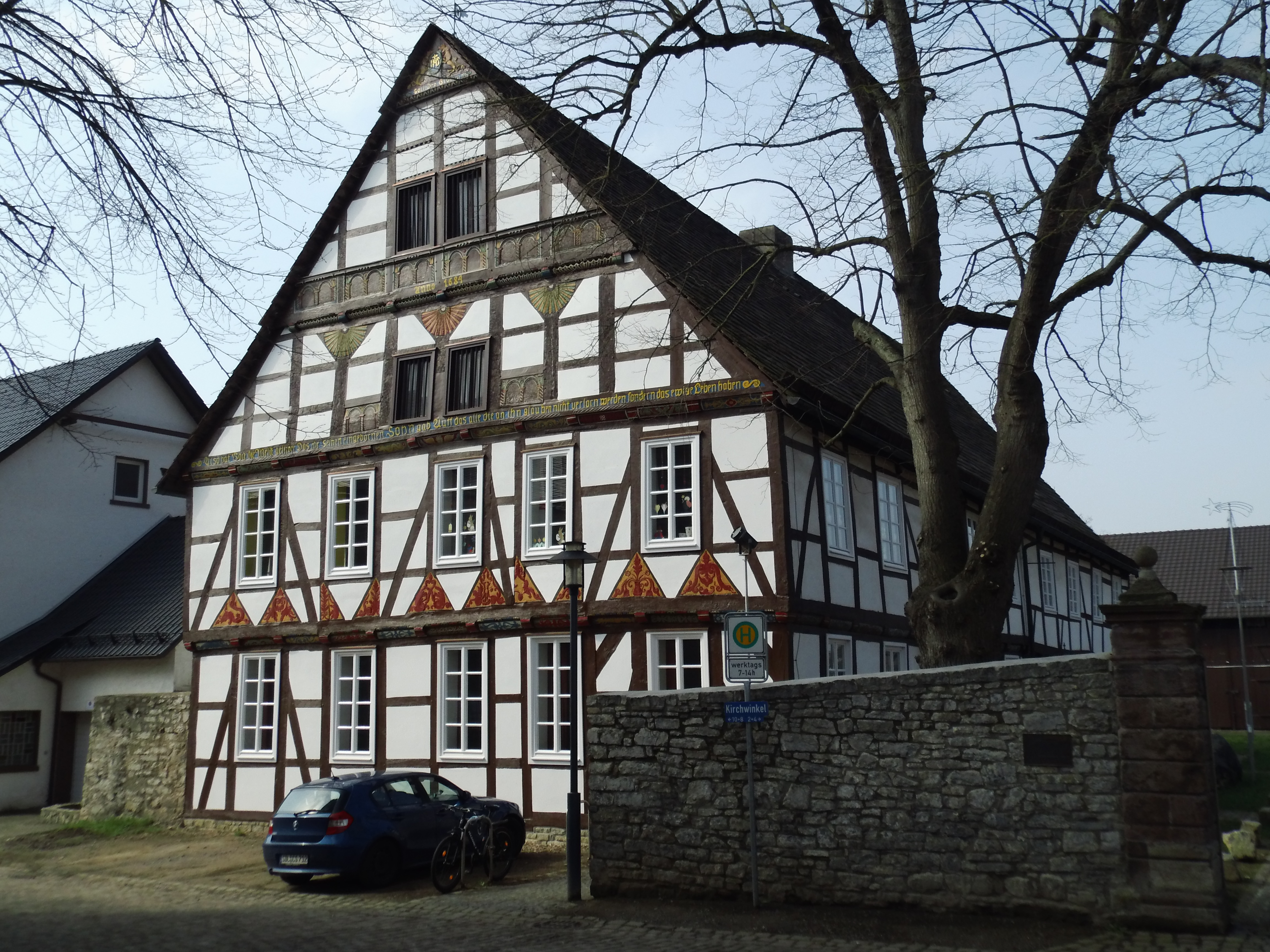 Baudenkmal, Liste der Baudenkmäler in Höxter Nr. 258